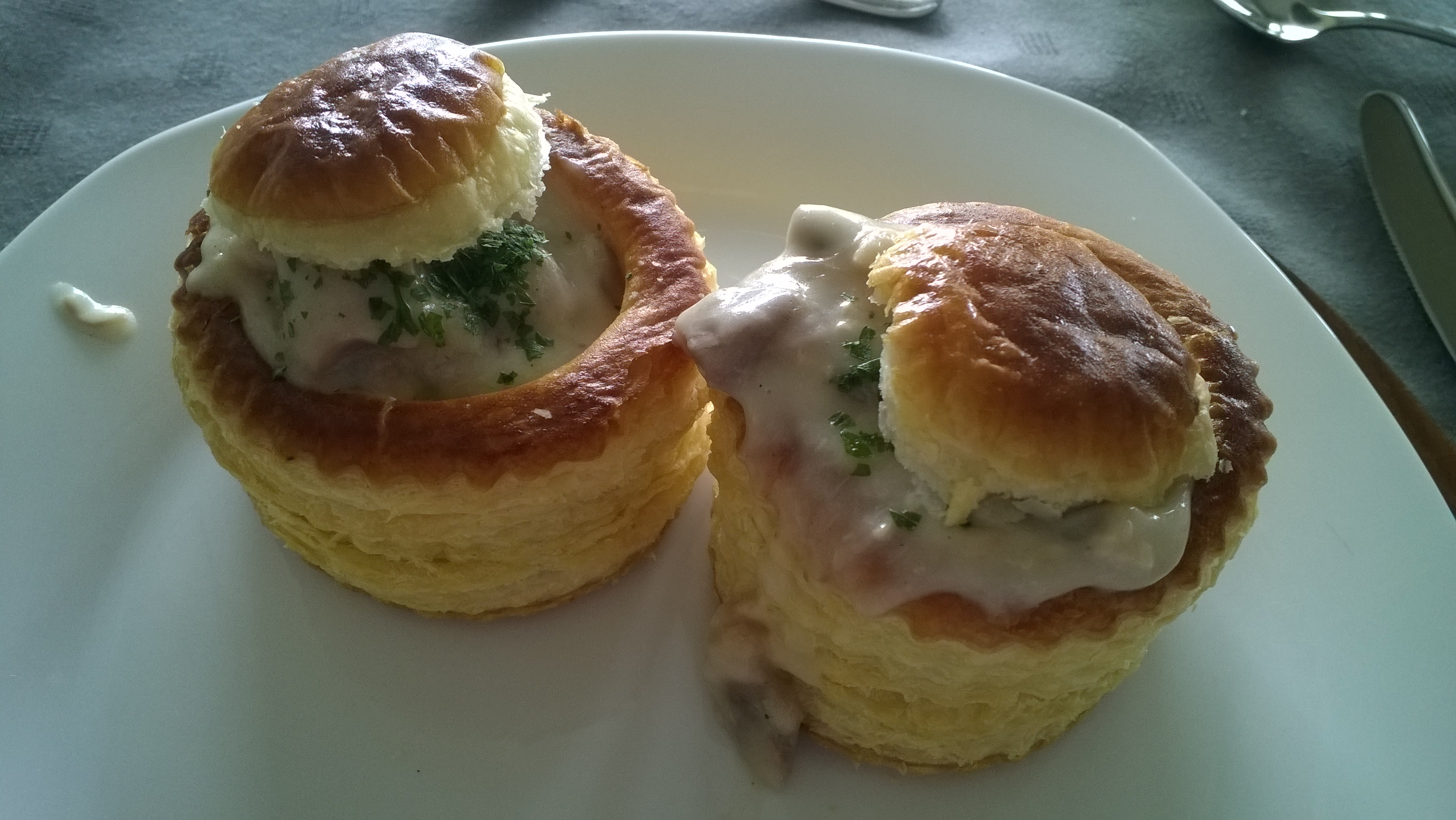 File:Koninginnehapje of vol-au-vent.jpg